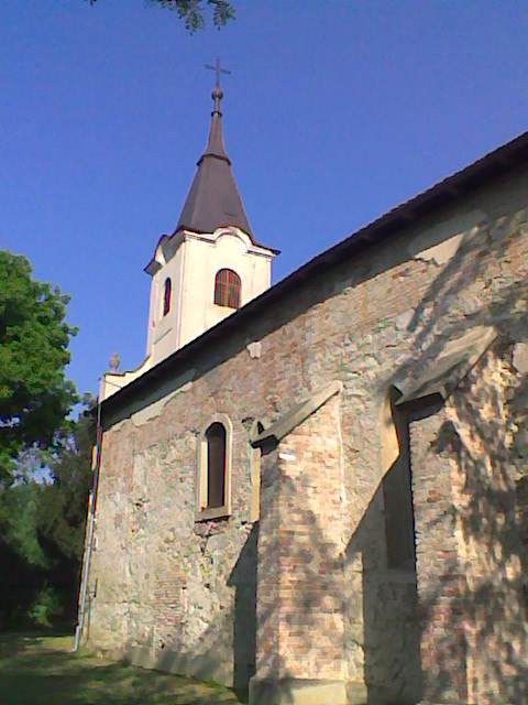 A tiszasülyi Szent László-templom